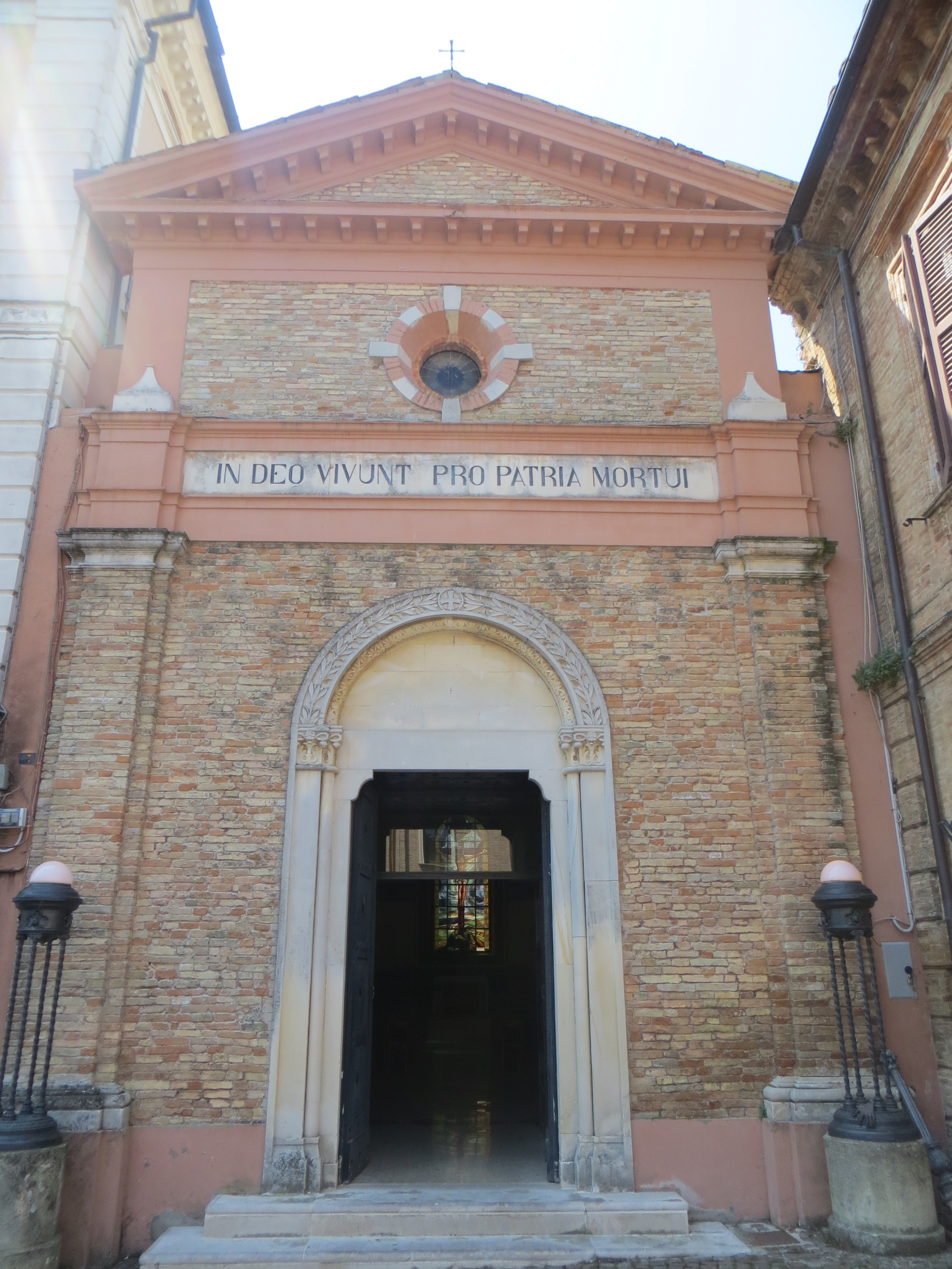 Chiesa di San Liberatore ad Atri